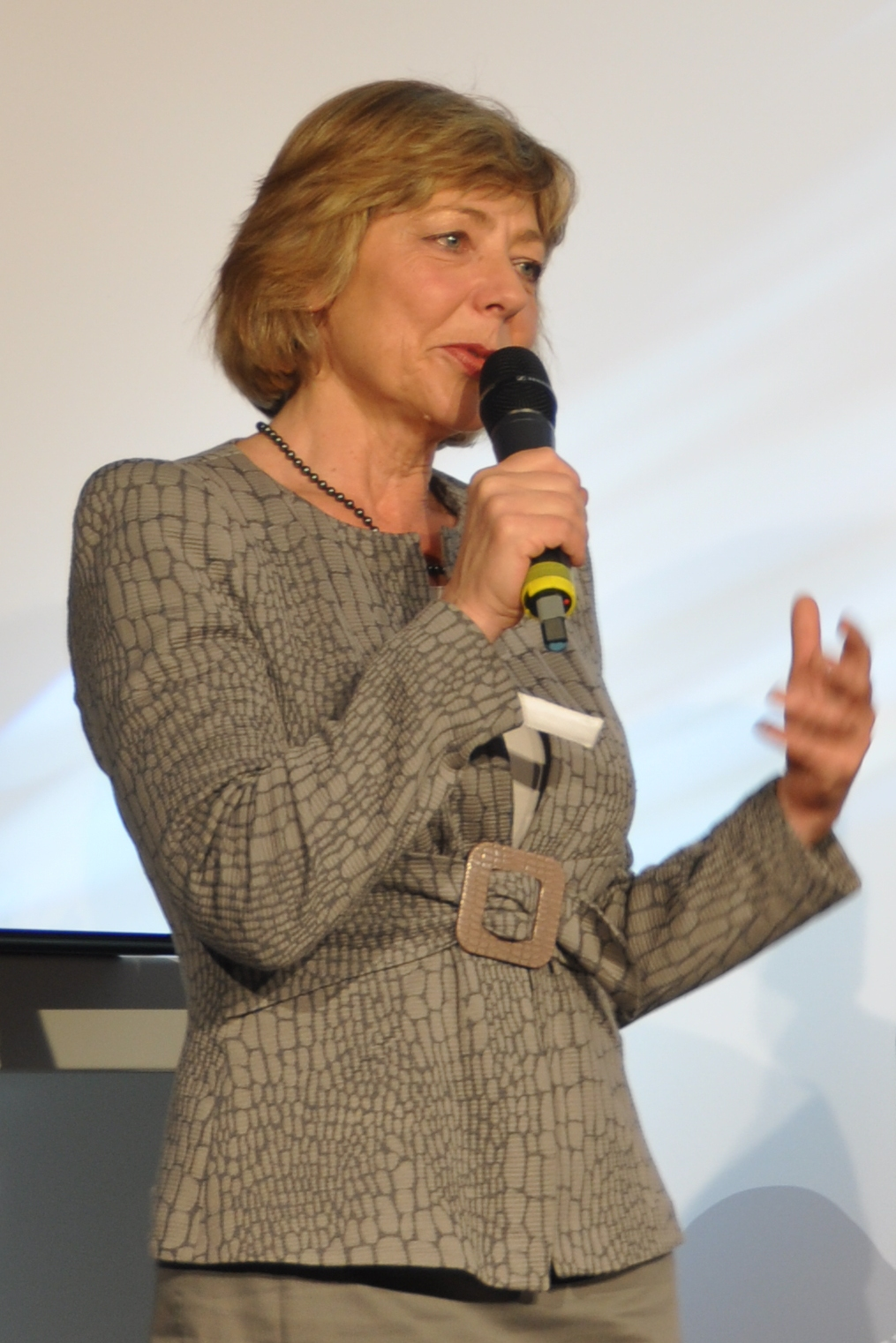 Daniela Schadt, Partnerin von Joachim Gauck